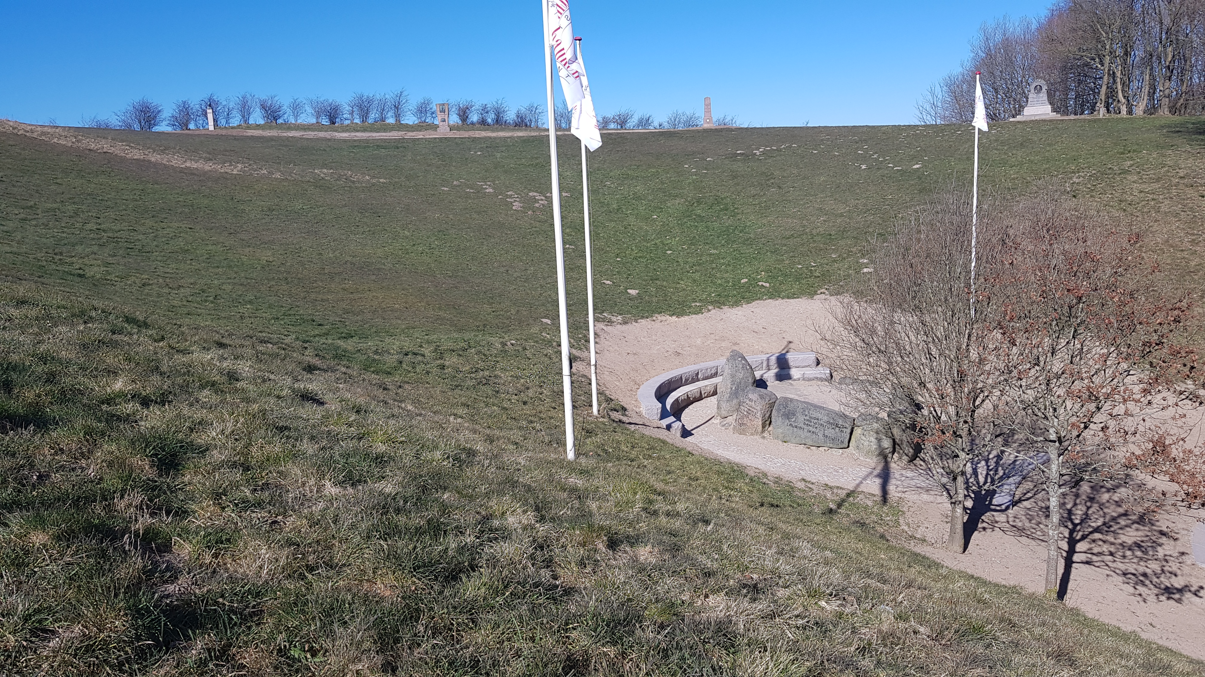 Talerstolen på Skamlingsbanken